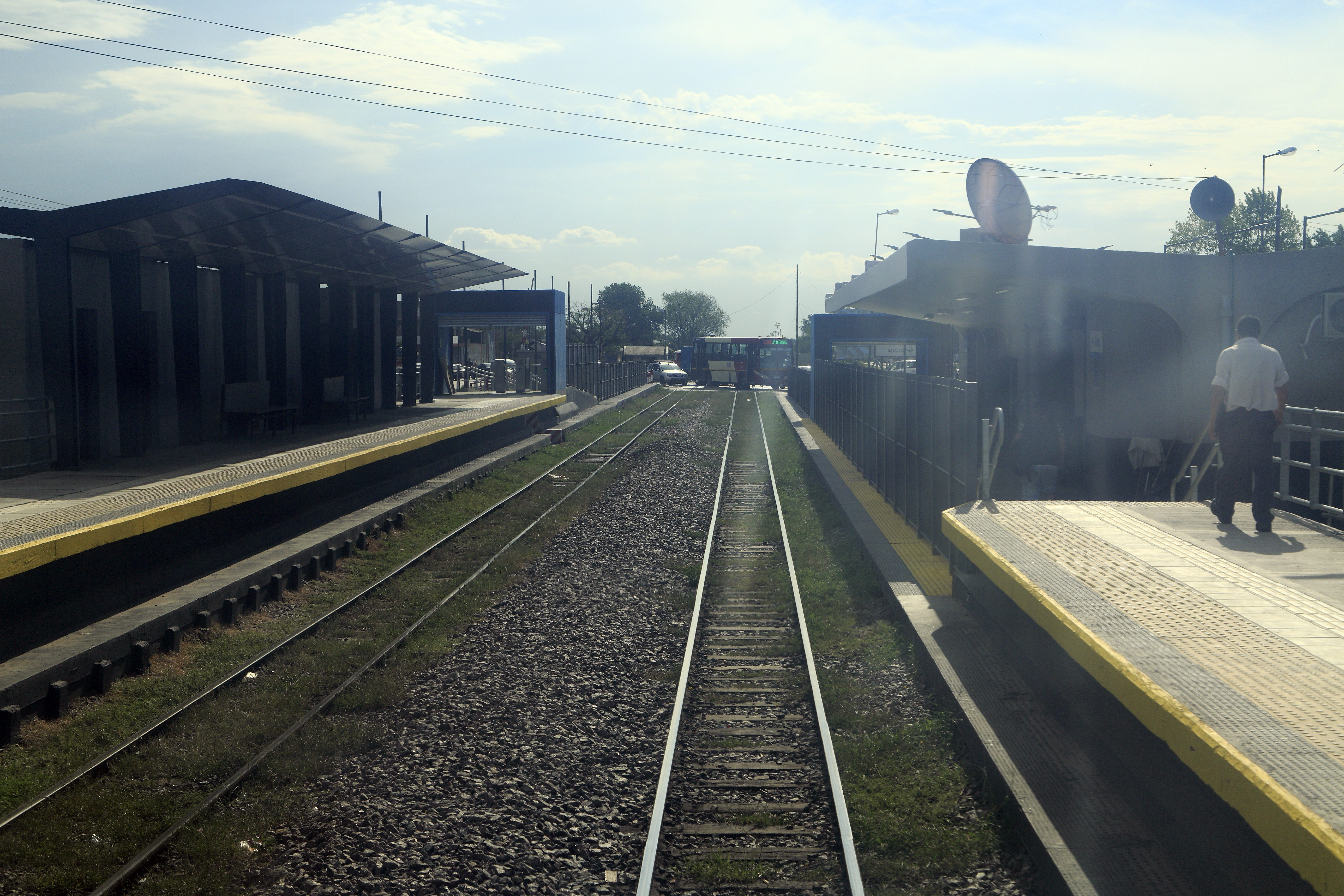 Línea Belgrano Sur, Streckensicht Richtung Marinos del Crucero General Belgrano. Die nachträglich erhöhten Bahnsteige und ihre ursprüngliche Höhe sind gut erkennbar, obwohl die Fensterscheibe in der Übergangstür verkratzt und vergilbt ist.